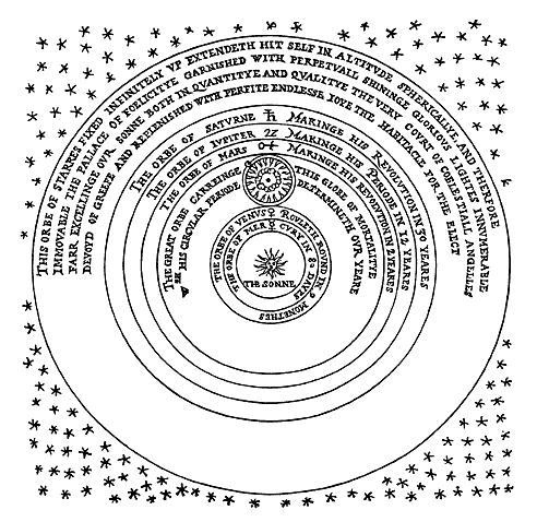 Système solaire selon Thomas Digges